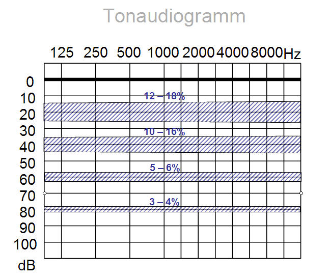 Lüscher-Test: Normale Unterschiedsschwellen für Tonintensitätsänderungen in Prozent in Abhängigkeit von der Frequenz und Tonintensität über der Hörschwelle. Nach E. Lüscher und J. Zwiskocki (1949)